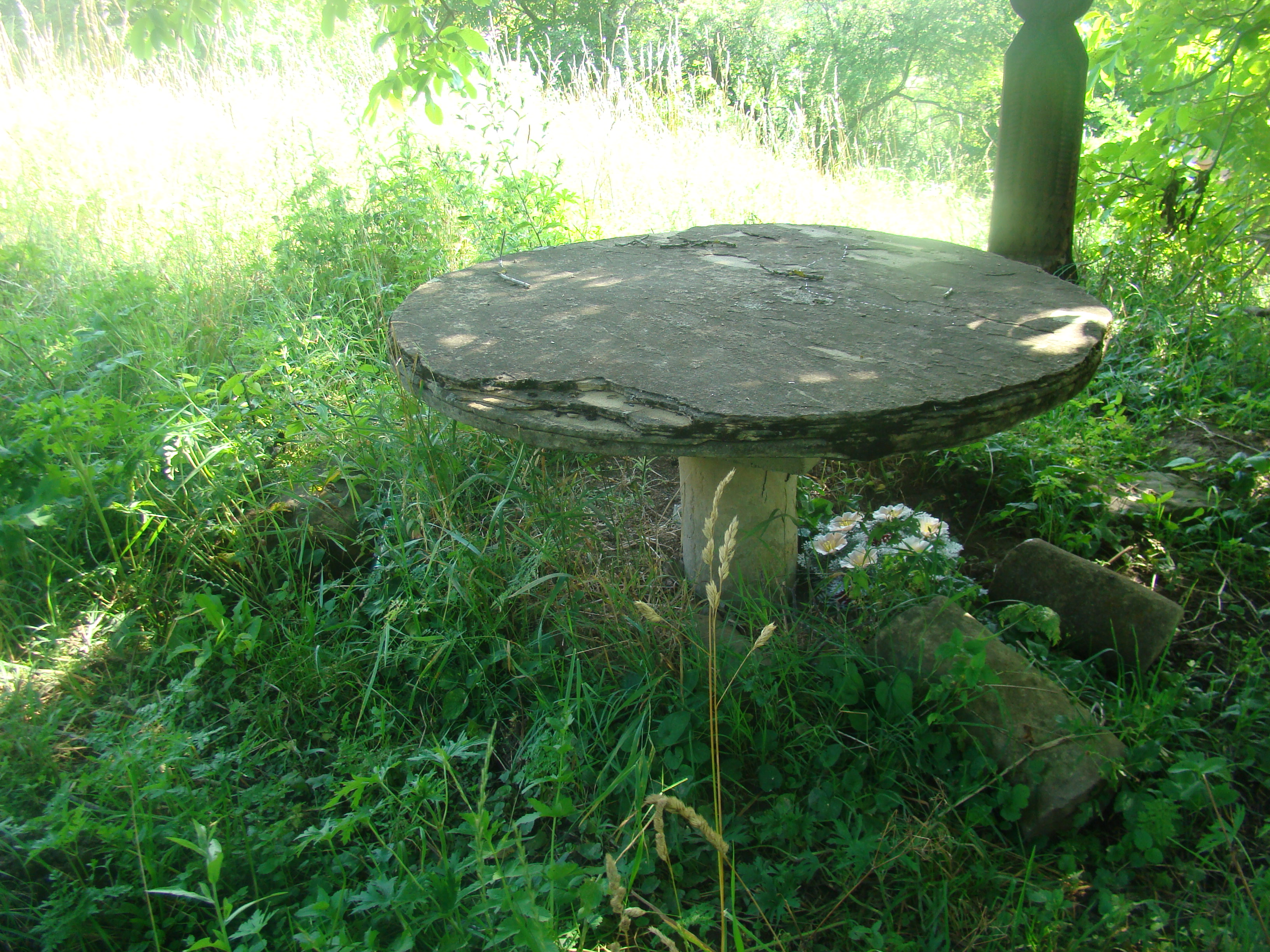 Biserica de lemn „Sfinții Arhangheli” din Băița, Mureș